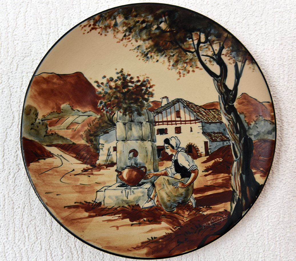 production de la poterie de Ciboure